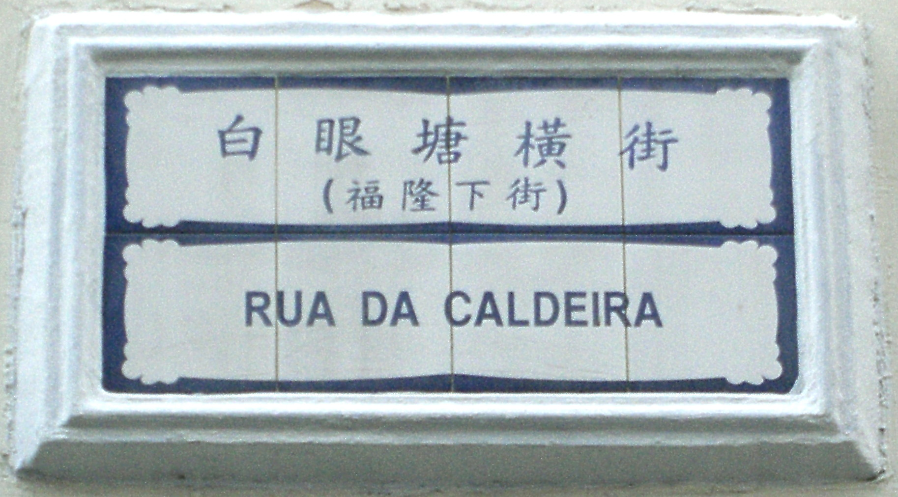 白眼塘橫街街名路牌